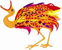 Nieuw logo van het Iraans Filmfestival, ontworpen door Rosa Vitalie in 2008